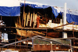 1995-96 låg Ingo på Hälsö och Öckerö för byte av bl.a. stäv och bordläggning. Även en del spant byttes ut tillsammans med däckstöttor, skarndäck samt ny brädgång. Detta var den (dittills) största enskilda investeringen som gjorts på Ingo i föreningens regi.